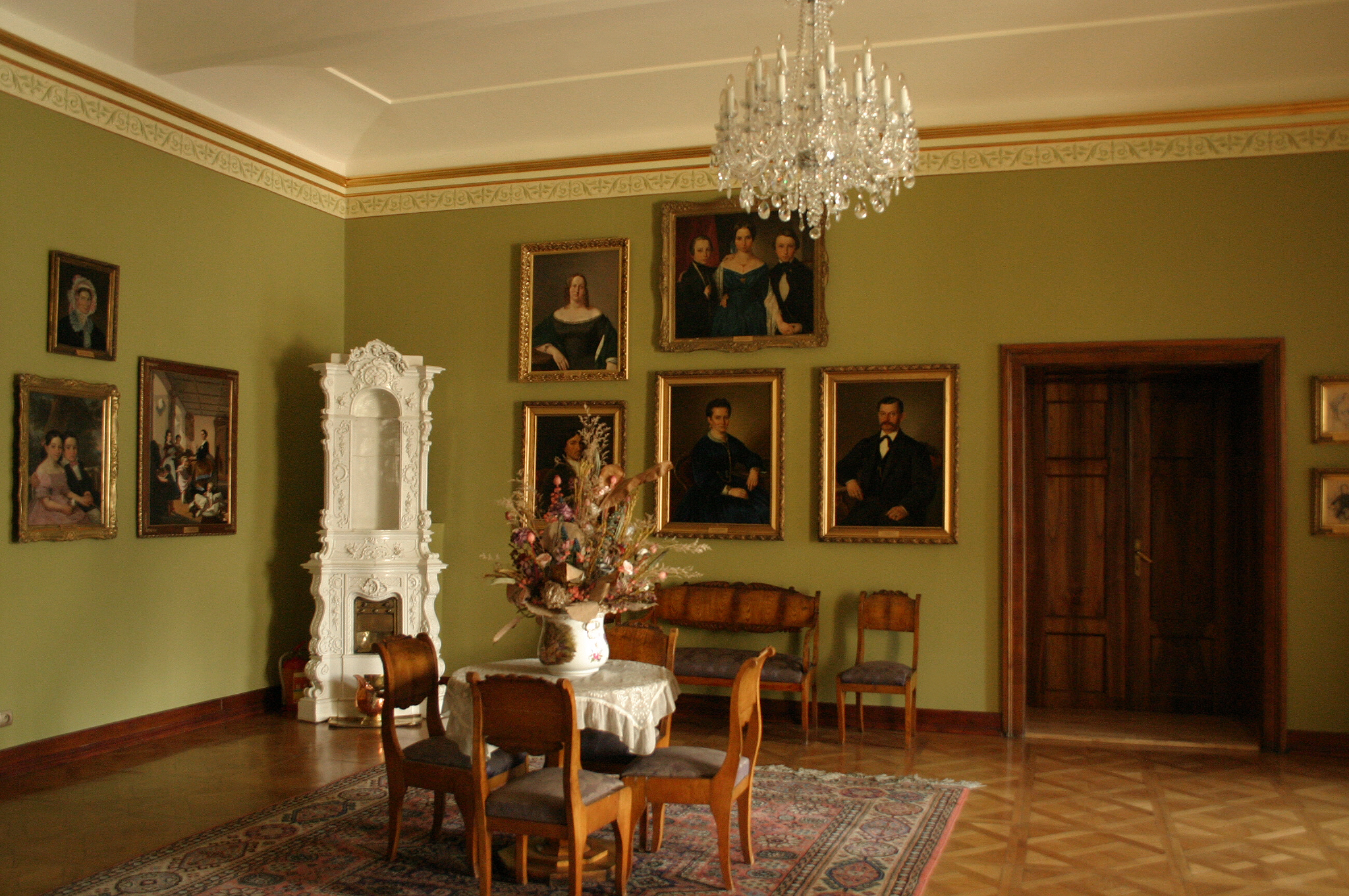 Alicja Migdał–Drost, Muzeum w Bielsku–Białej